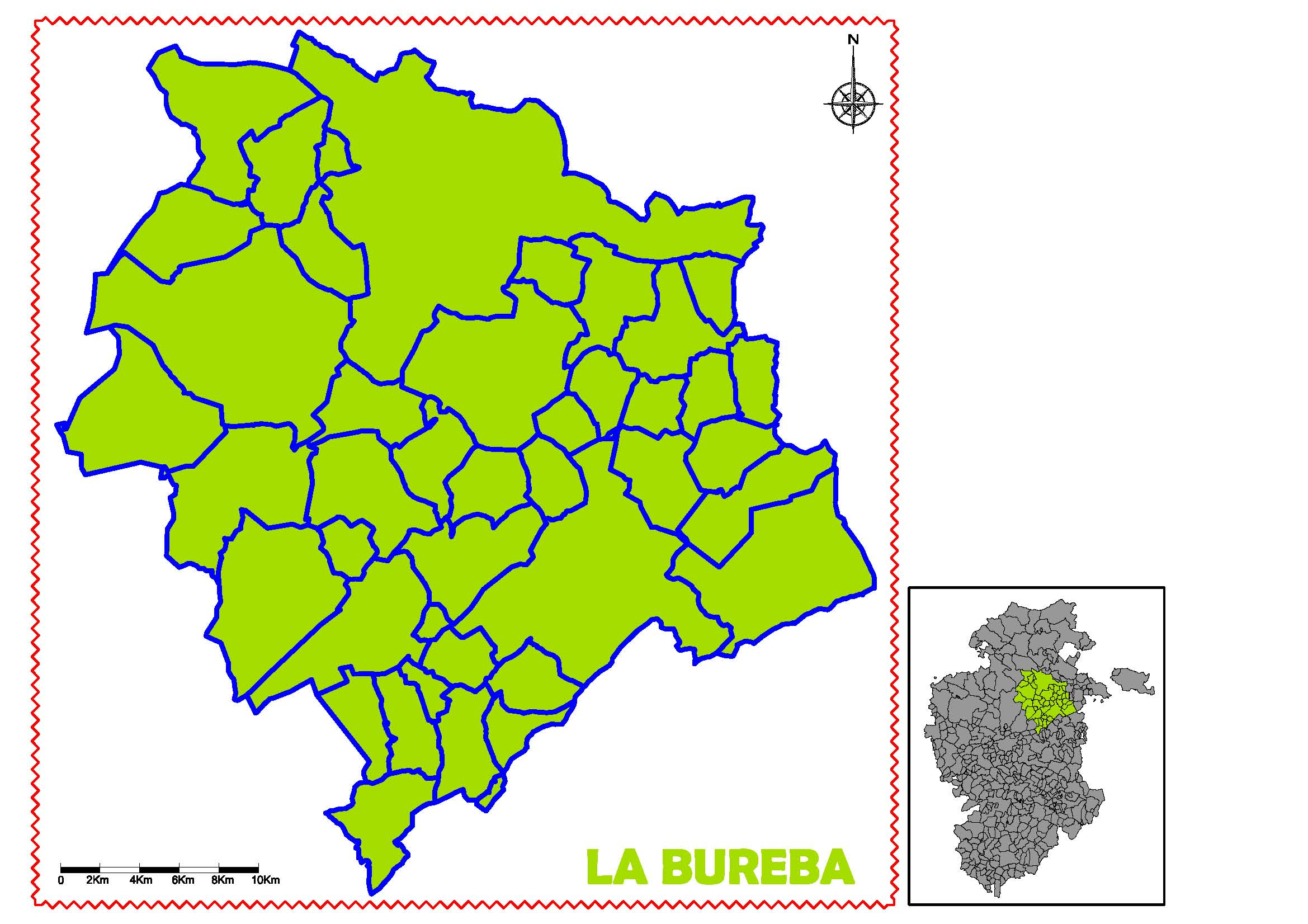 Ubicación de la comraca de Bureba en la provincia de Burgos